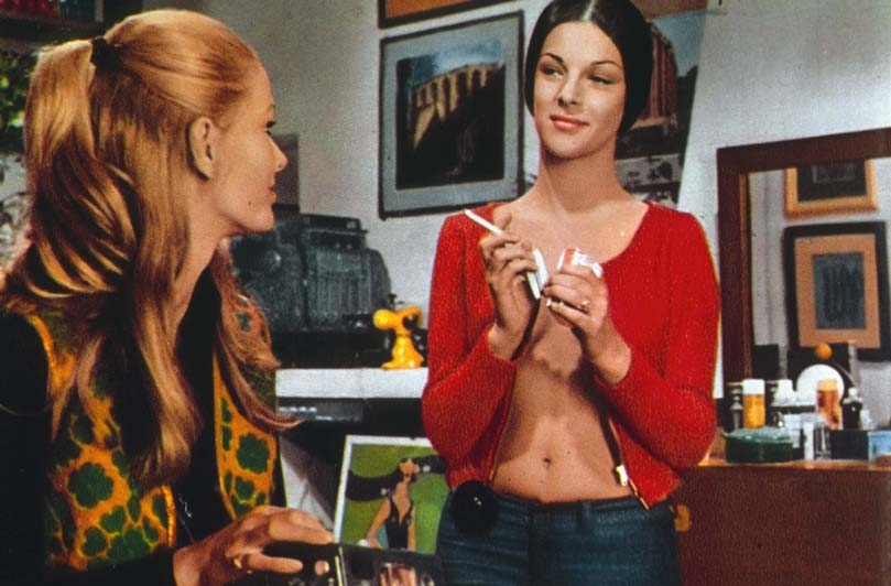 Le attrici Ida Galli (a sinistra) e Antonia Santilli (a destra) in uno scatto di scena sul set del film Grazie signore p... (1972) di Renato Savino.